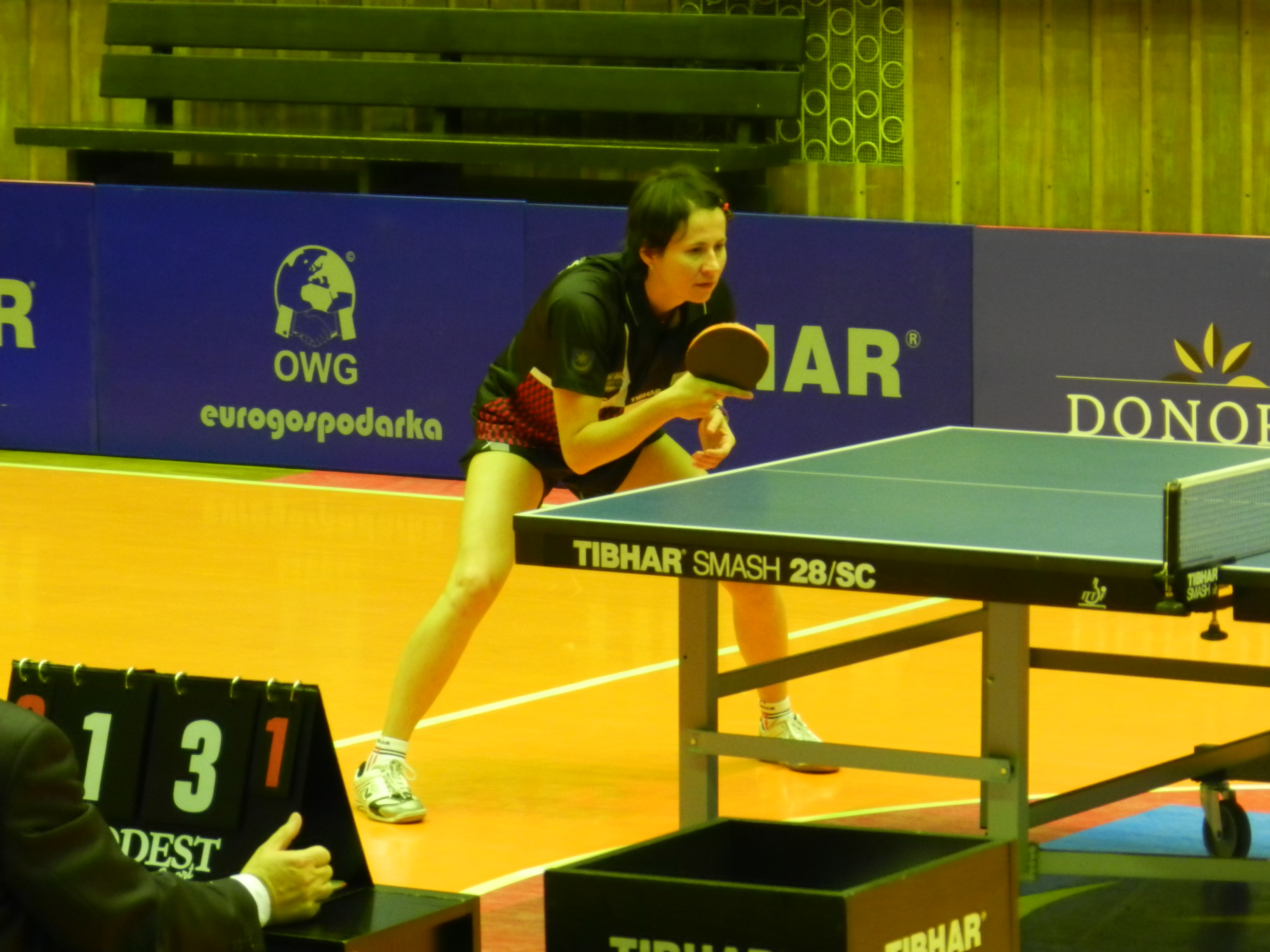 Renata Štrbíková broniąca barw KTS Tarnobrzeg w meczu ligowym z KU AZS AJD Częstochowa w dniu 13 listopada 2012 roku.